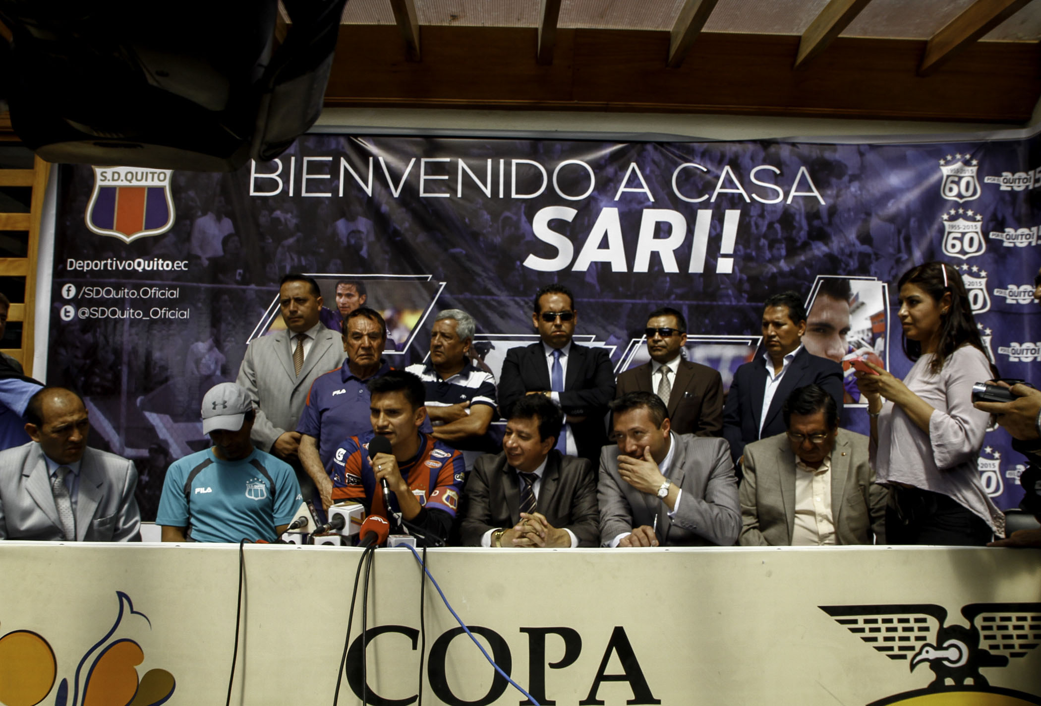 Quito, 03 mar (ANDES).- El equipo del Deportivo Quito presentó en su sede ubicada al norte de Quito, a su nueva contratación Luis Fernando Saritama. Foto: Micaela Ayala V./ANDES